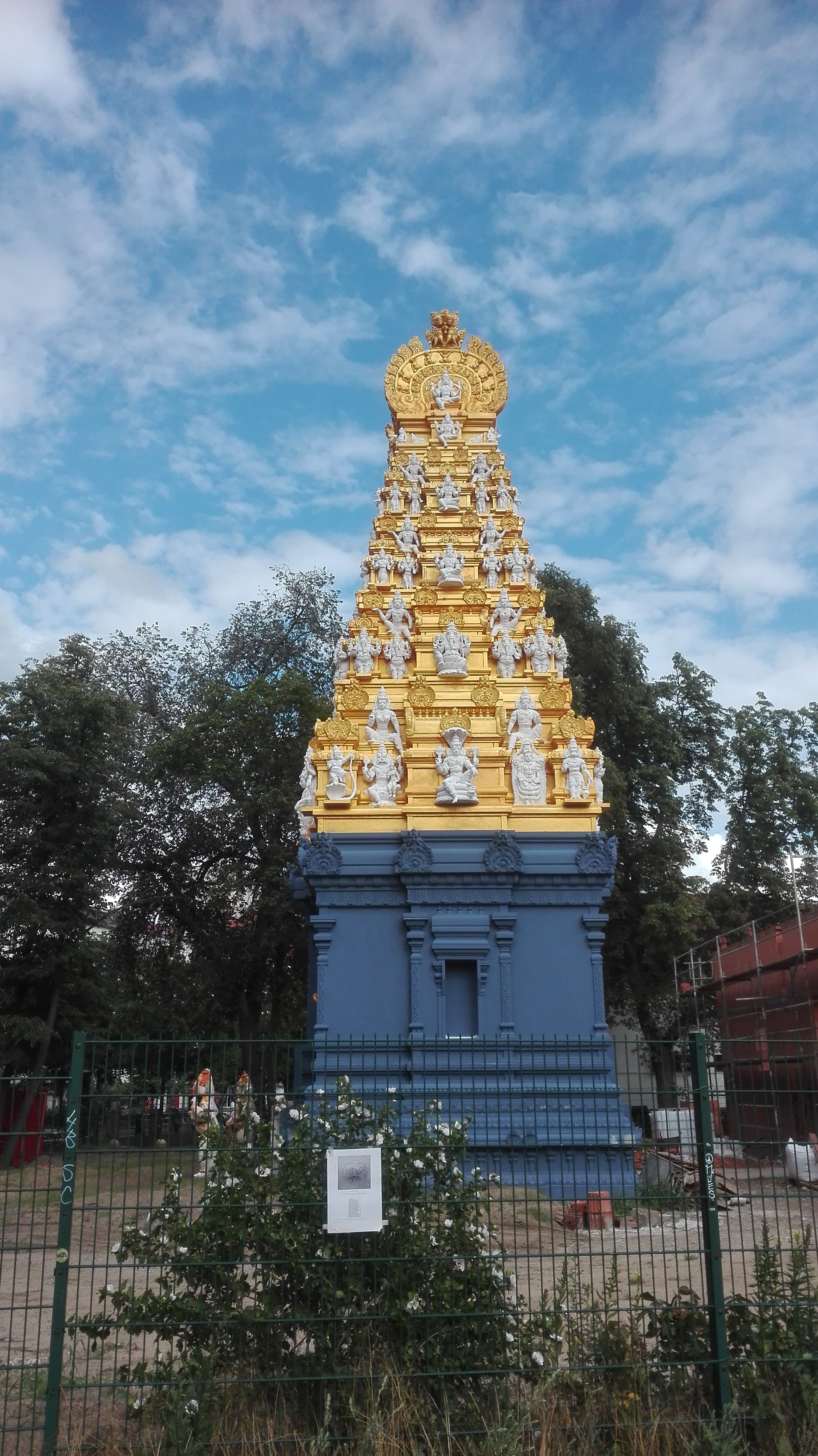 Sri-Ganesha-Hindu-Tempel Berlin (Juli 2020), Seitenansicht